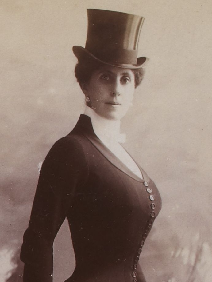 [Album Reutlinger de portraits divers, vol. 25] : [photographie positive] : Thérèse Renz ; Lély